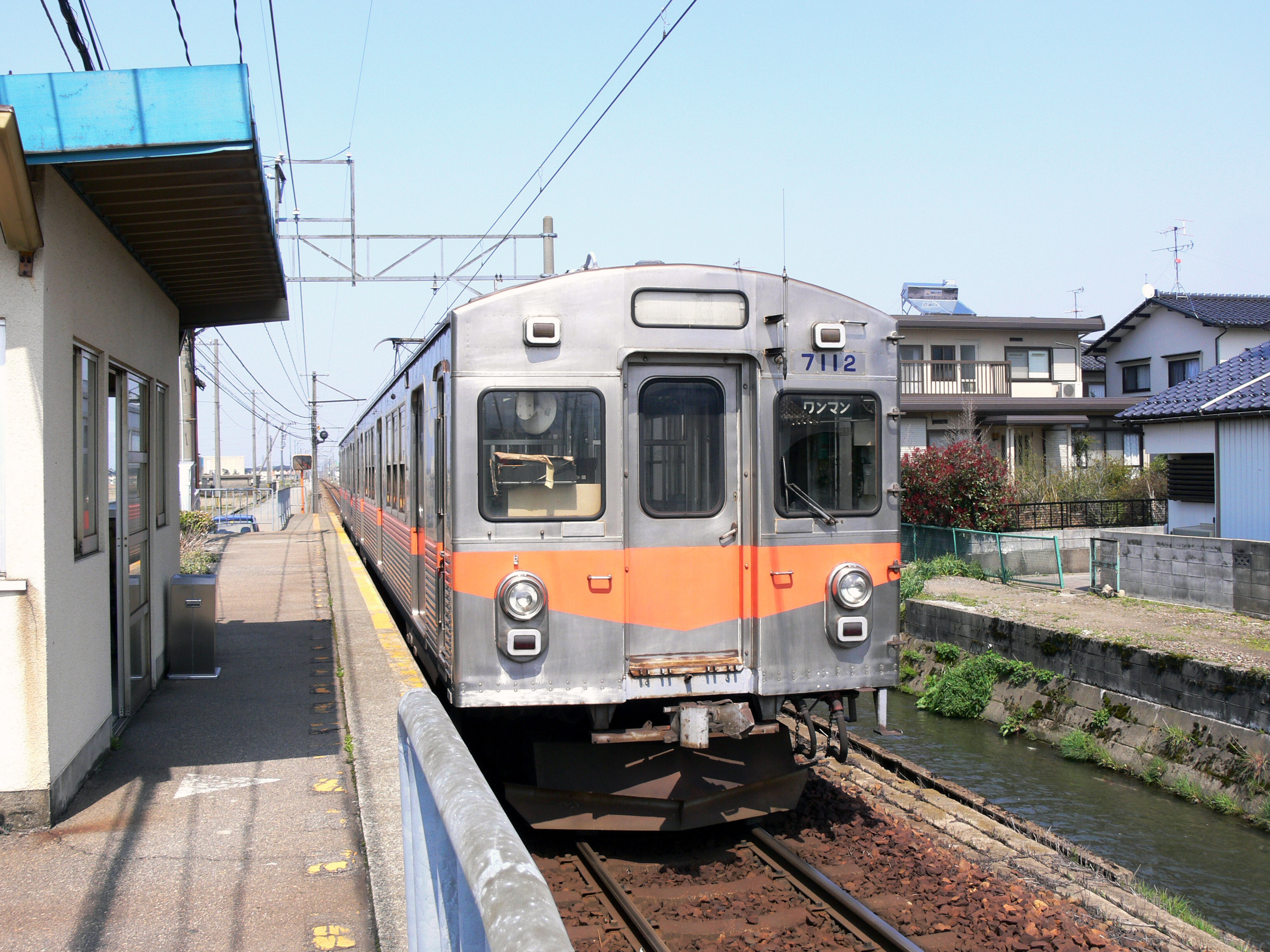 曽谷駅